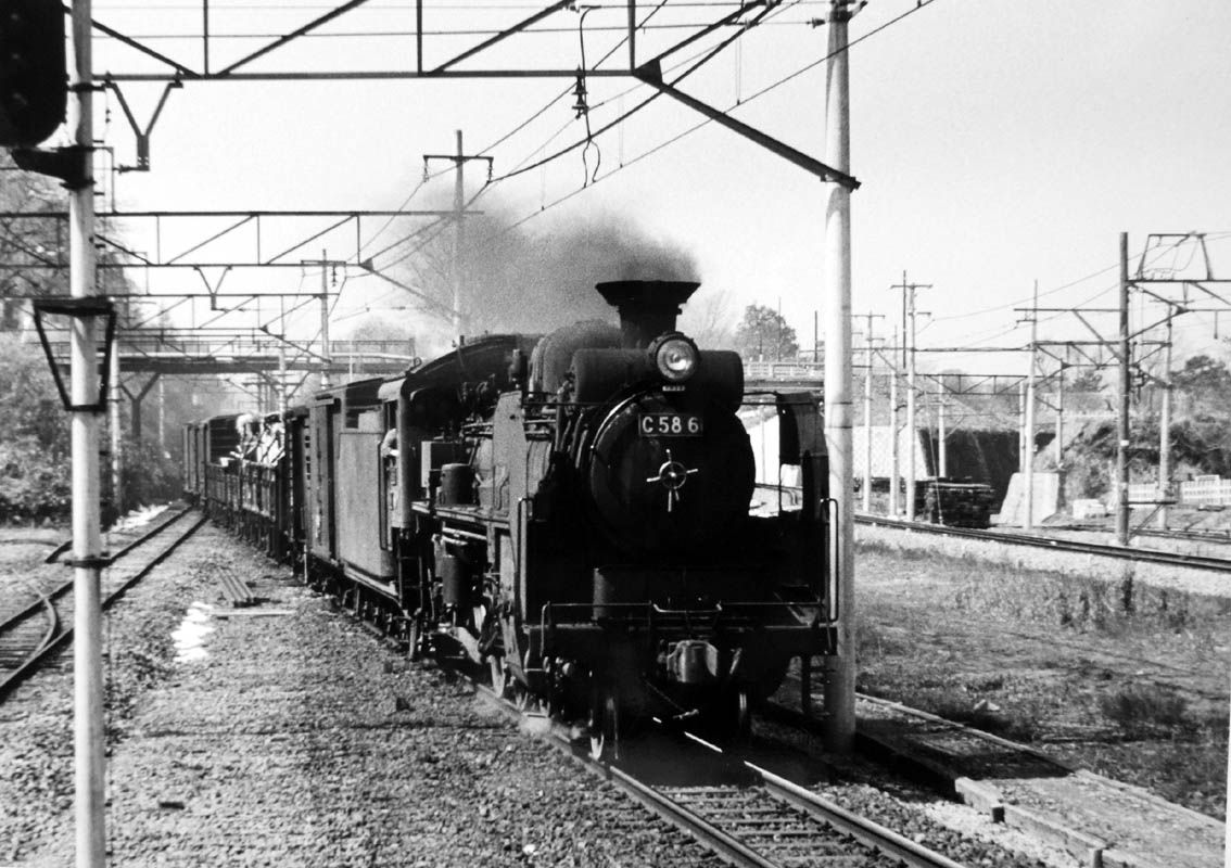 長津田駅に進入する C58 6 牽引の横浜線貨物列車。昭和44年撮影。